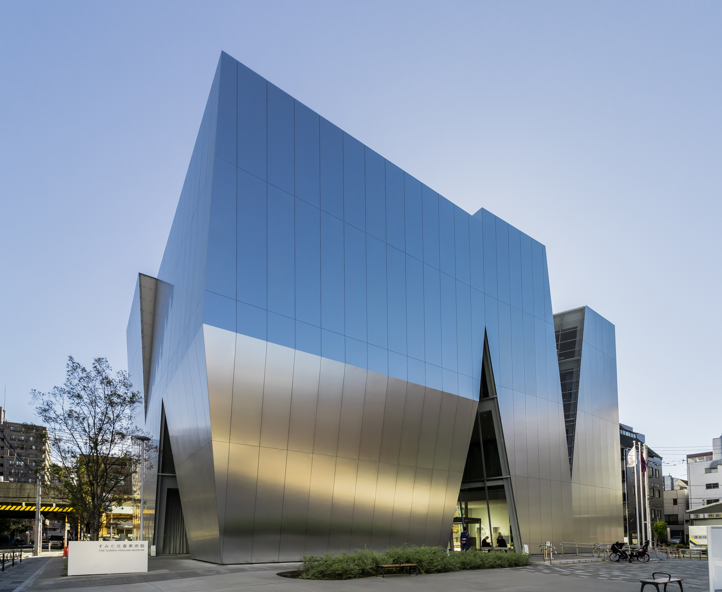 すみだ北斎美術館。妹島和世建築設計事務所（2016）。